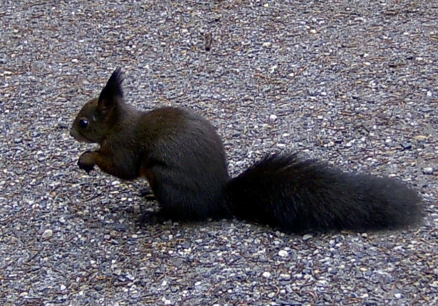 Eichhörnchen, (Braune Farbvariante), Davos, Schweiz